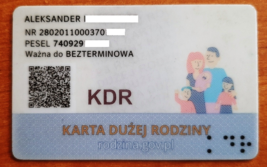 Karta Dużej Rodziny KDR awers